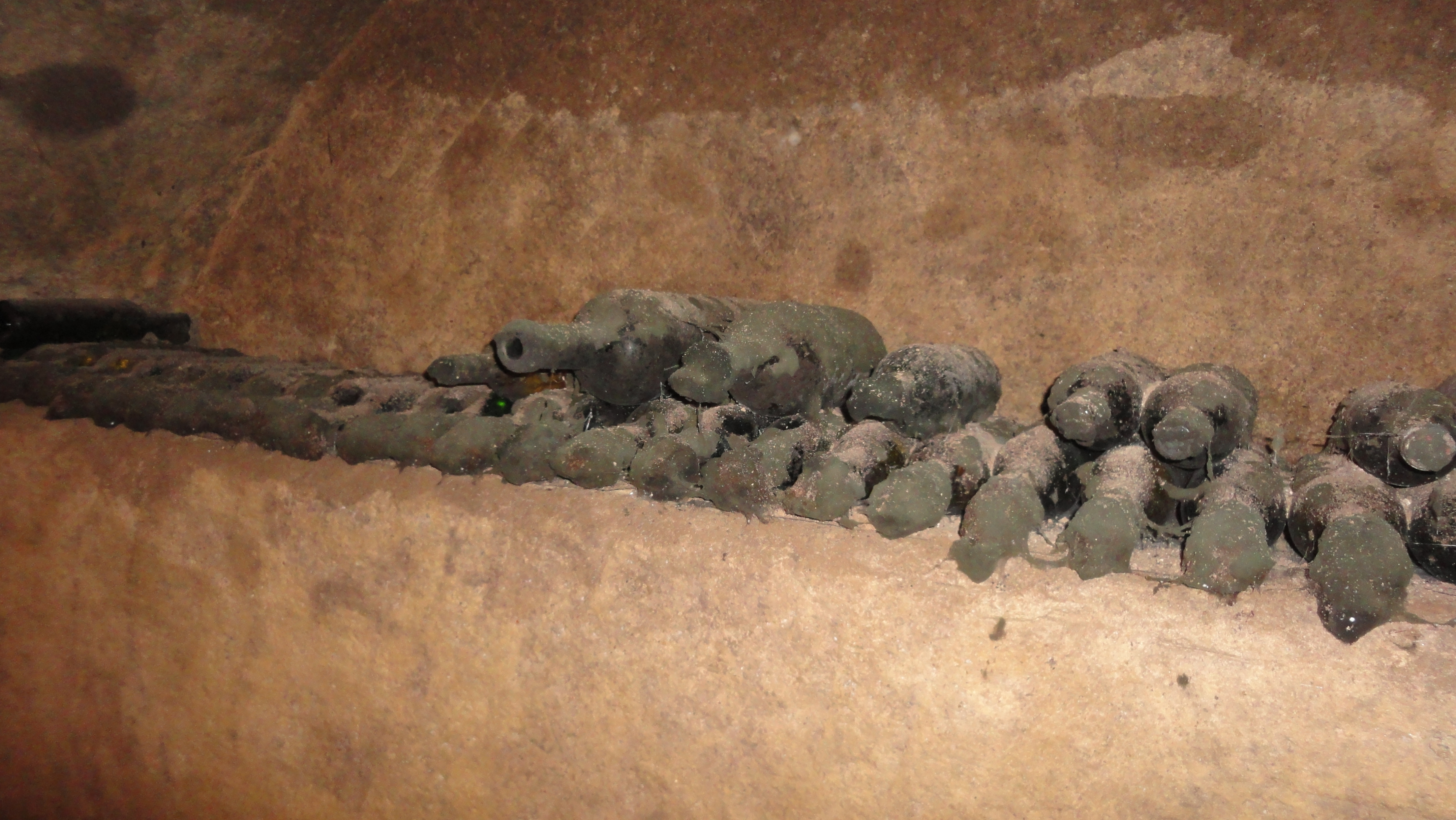 Schimmelpitz (Kellerkatze) in dem Weinkeller "Feuerkogl" in Röschitz.